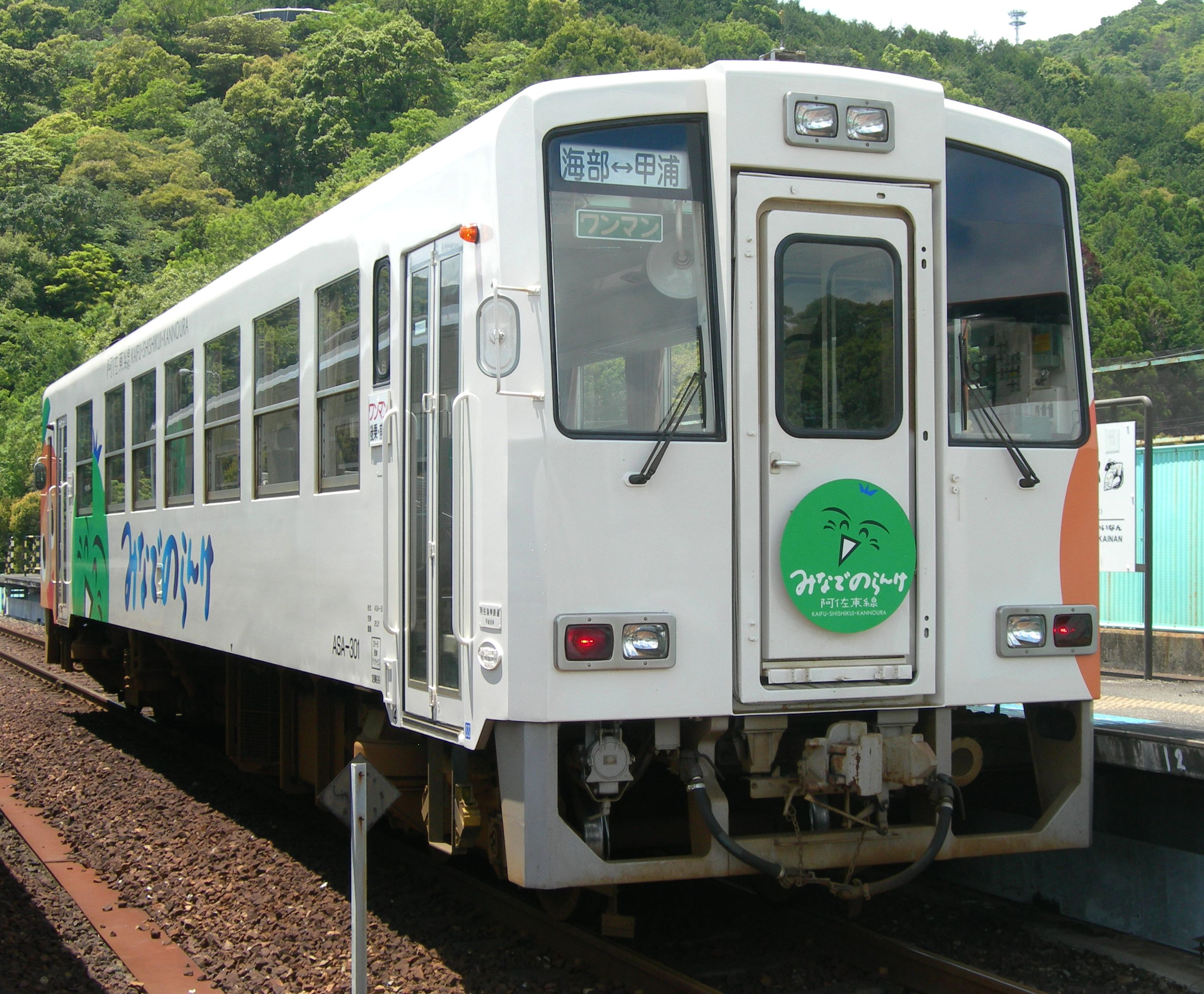 阿佐海岸鉄道・ASA-300形「たかちほ」(301)